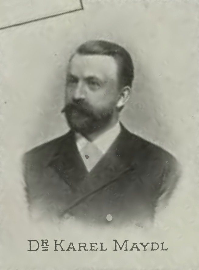 Portrét – MUDr. Karel Maydl (1853-1903), Český lékař-chirurg.